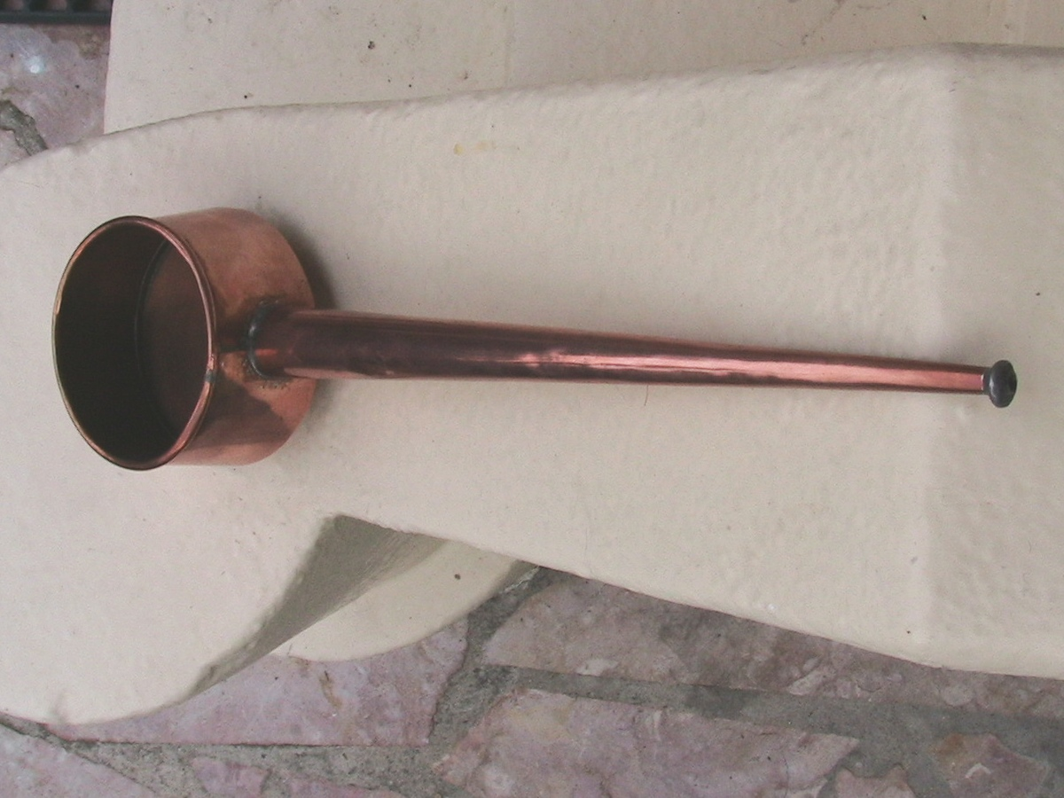 Kopetxa